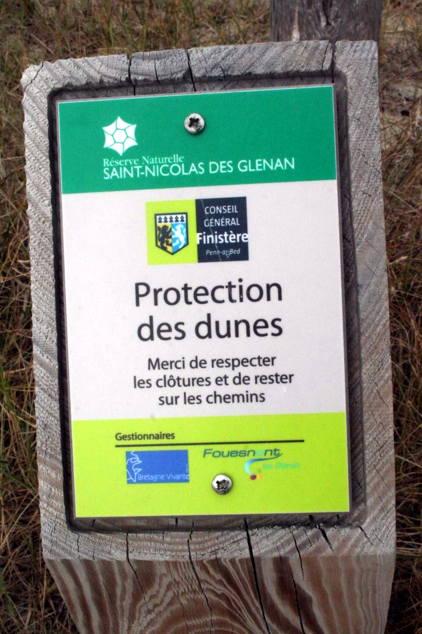 Panneau de balisage pour la réserve naturelle de Saint-Nicolas des Glénan